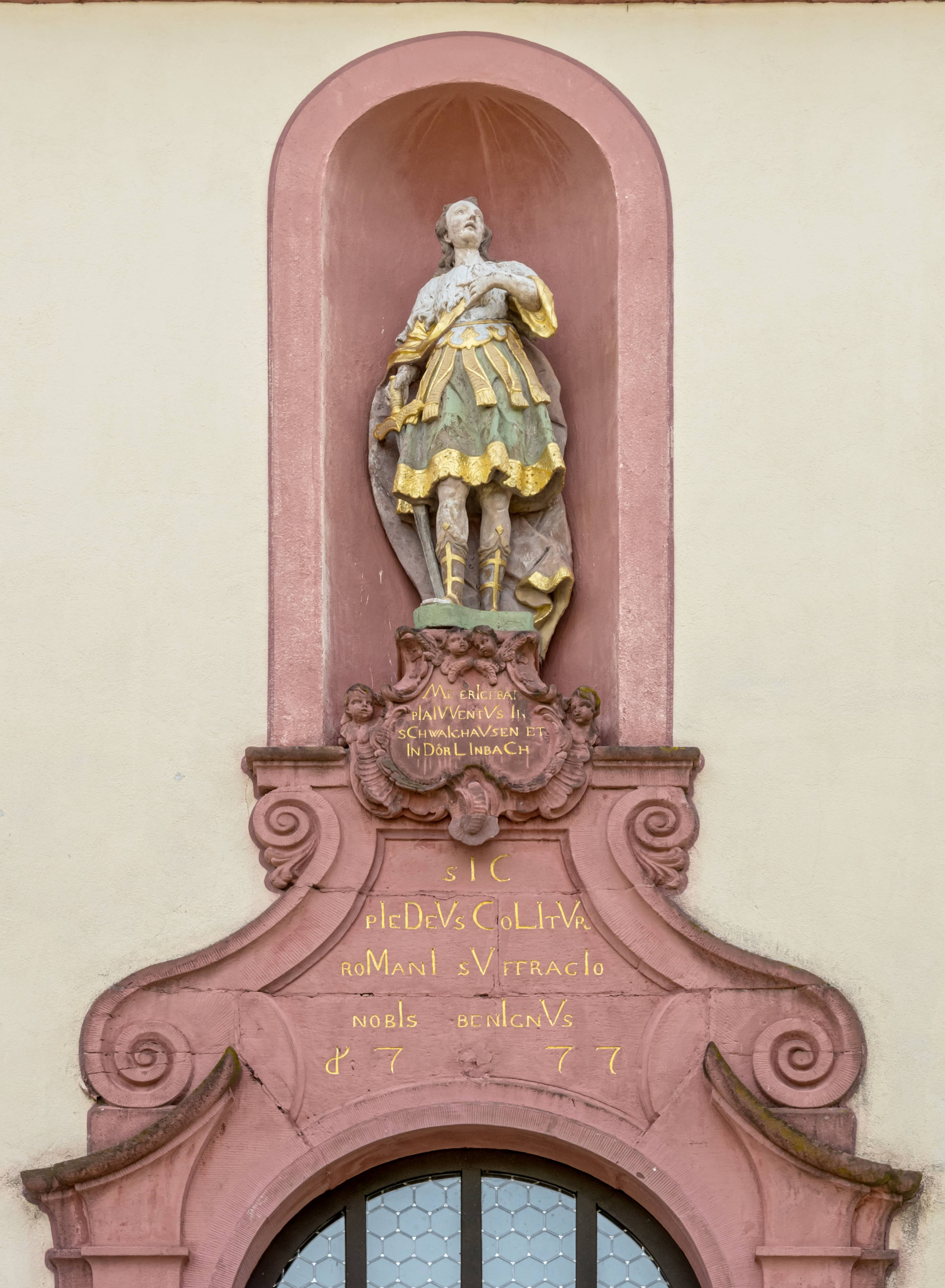 Bilder von der Kirche St. Romanus in Schweighausen Figur über dem Haupteingang